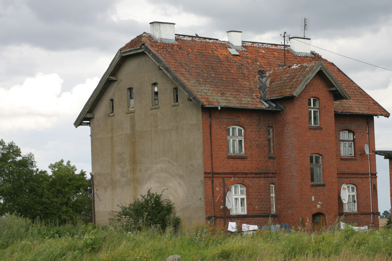 Parys - budynek dawnej stacji kolejowej